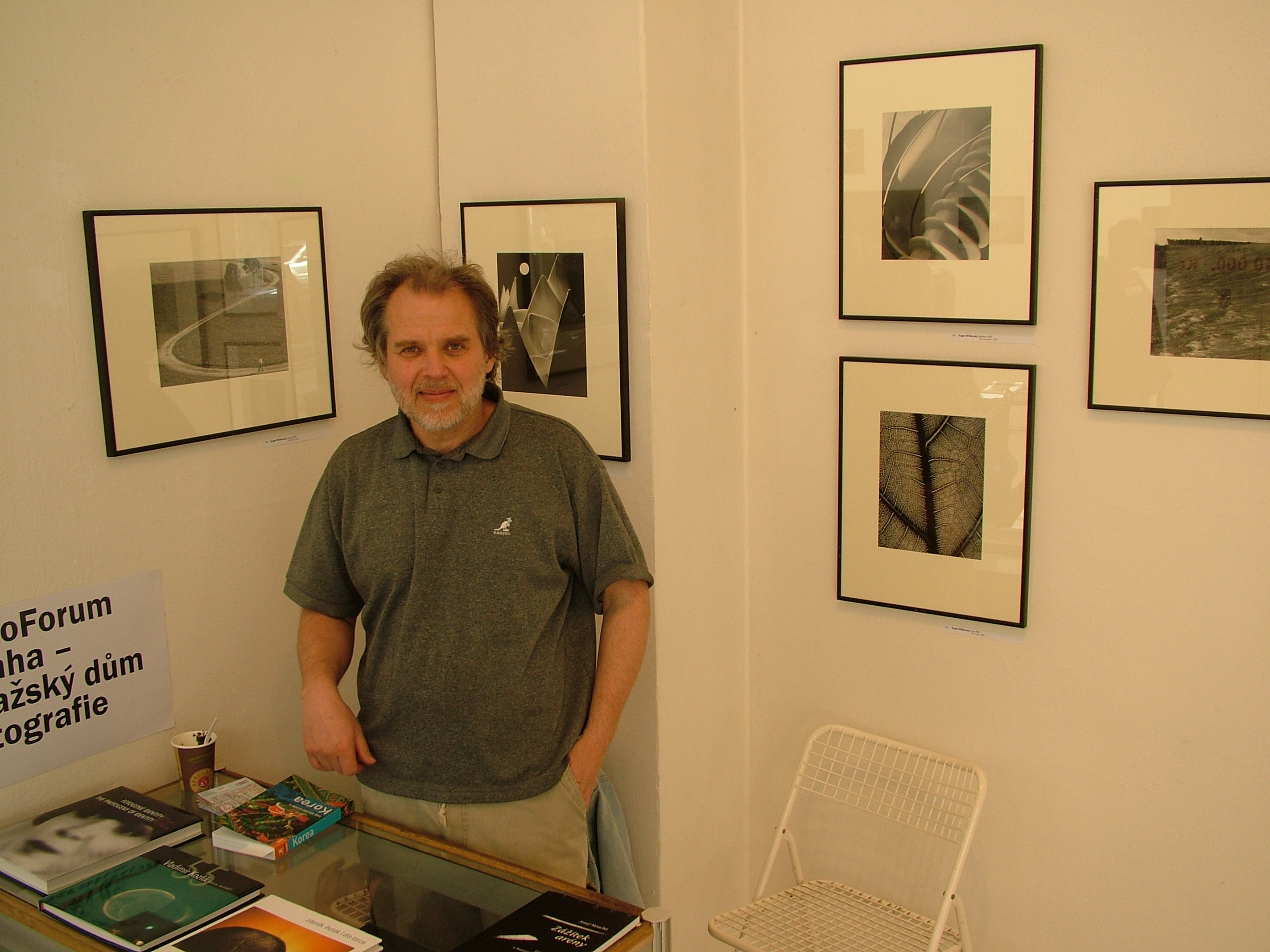 Výstava, festival, Prague Photo 2011 Budova: Mánes, Praha Trvání: od 4. dubna do 10. dubna 2011. Datum: 10. dubna 2011.